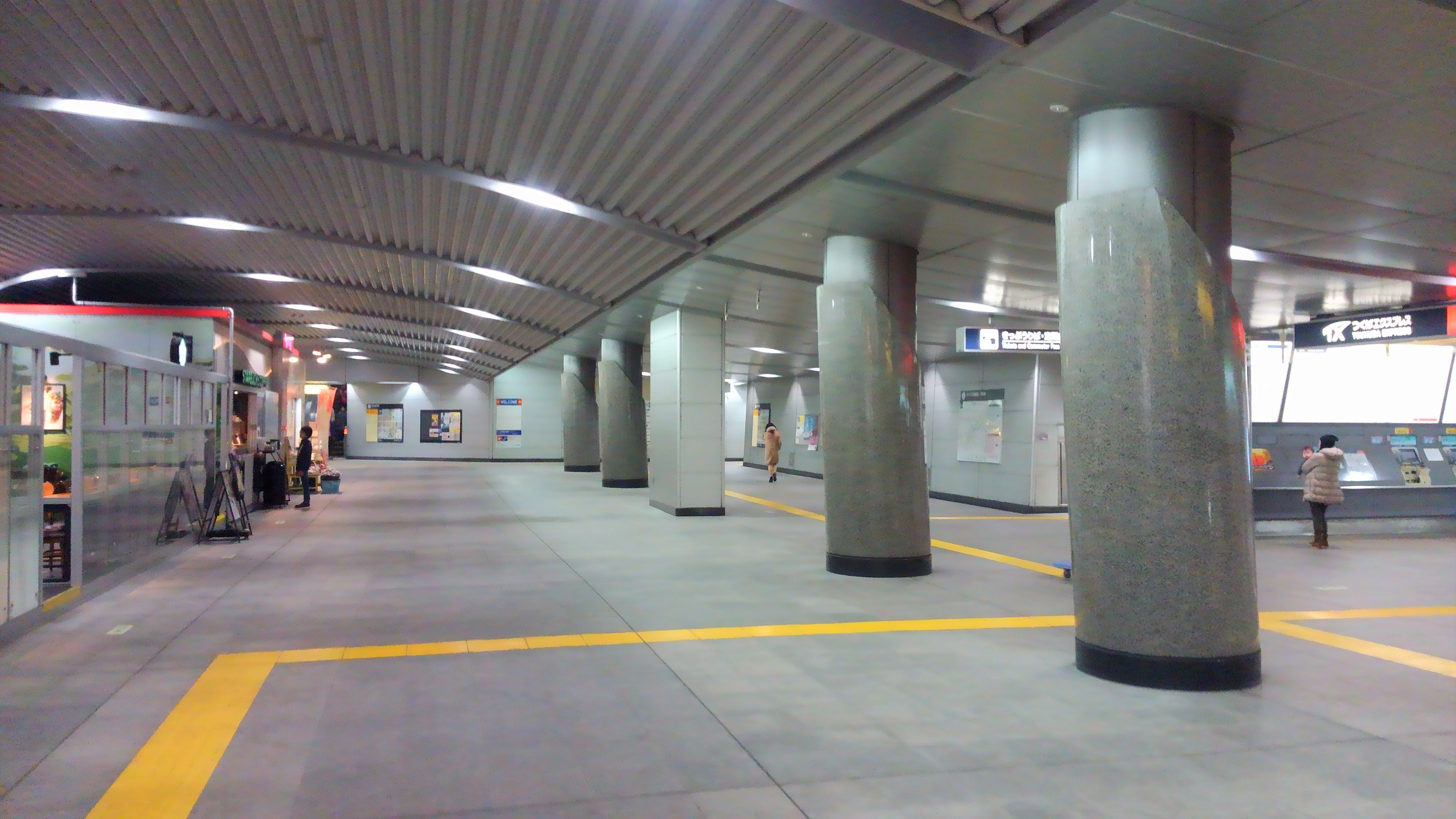 つくば駅改札前の南北自由通路。都市計画道路であり、茨城県道24号土浦境線の一部。